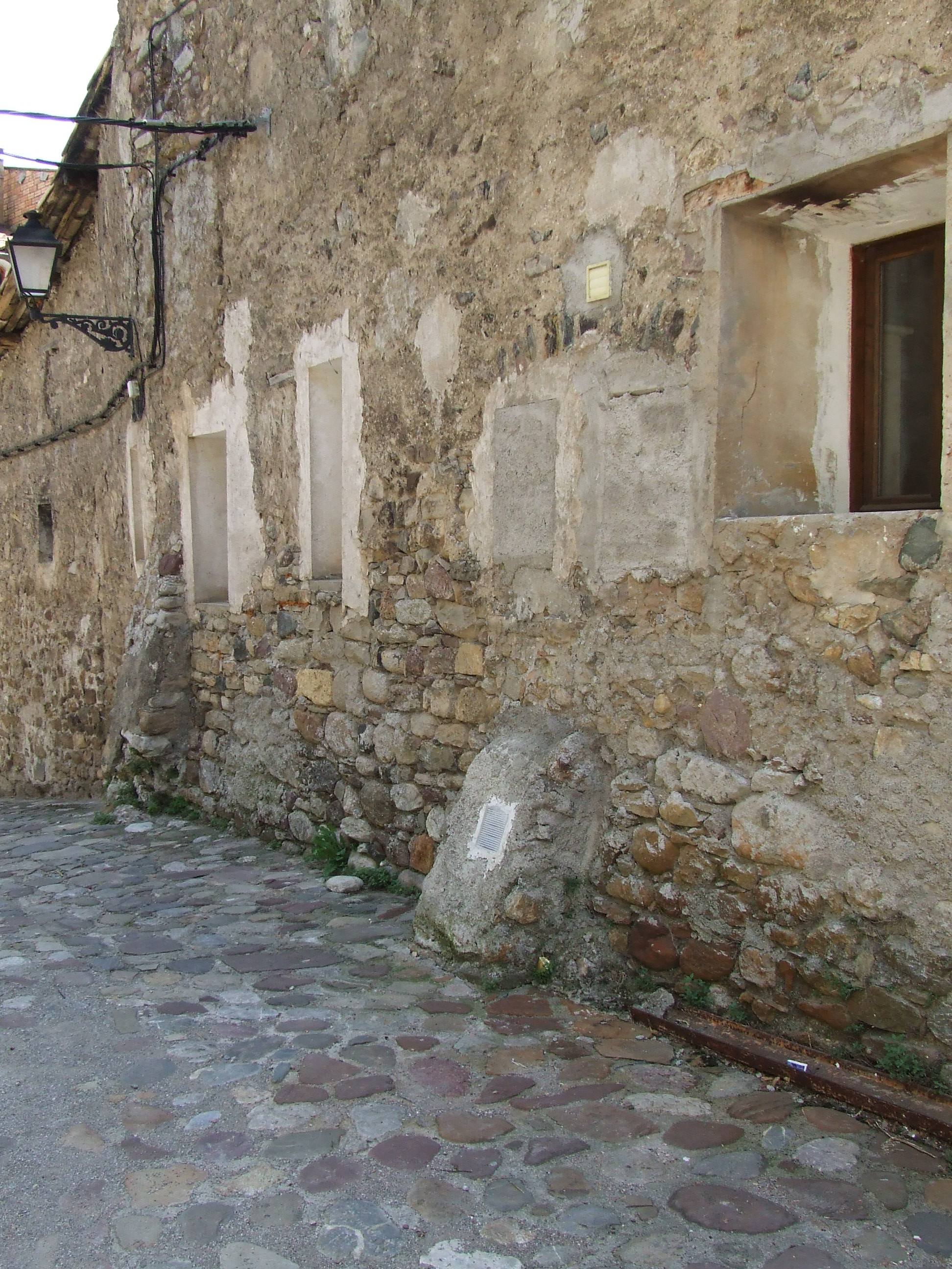 Murs amb filades medievals de l'antic monestir de Santa Grata, a Senterada (Pallars Jussà)